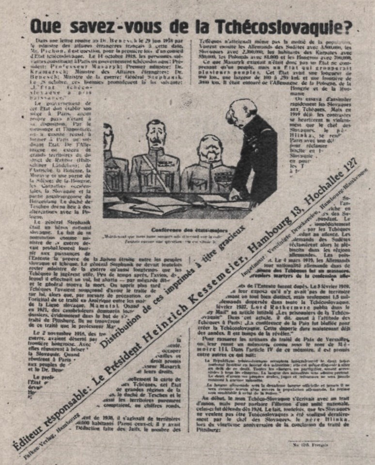 "Fac-similé d'un tract édité à Hambourg et distribué gratuitement dans les rues de Paris avec le concours de la 5e colonne en France".